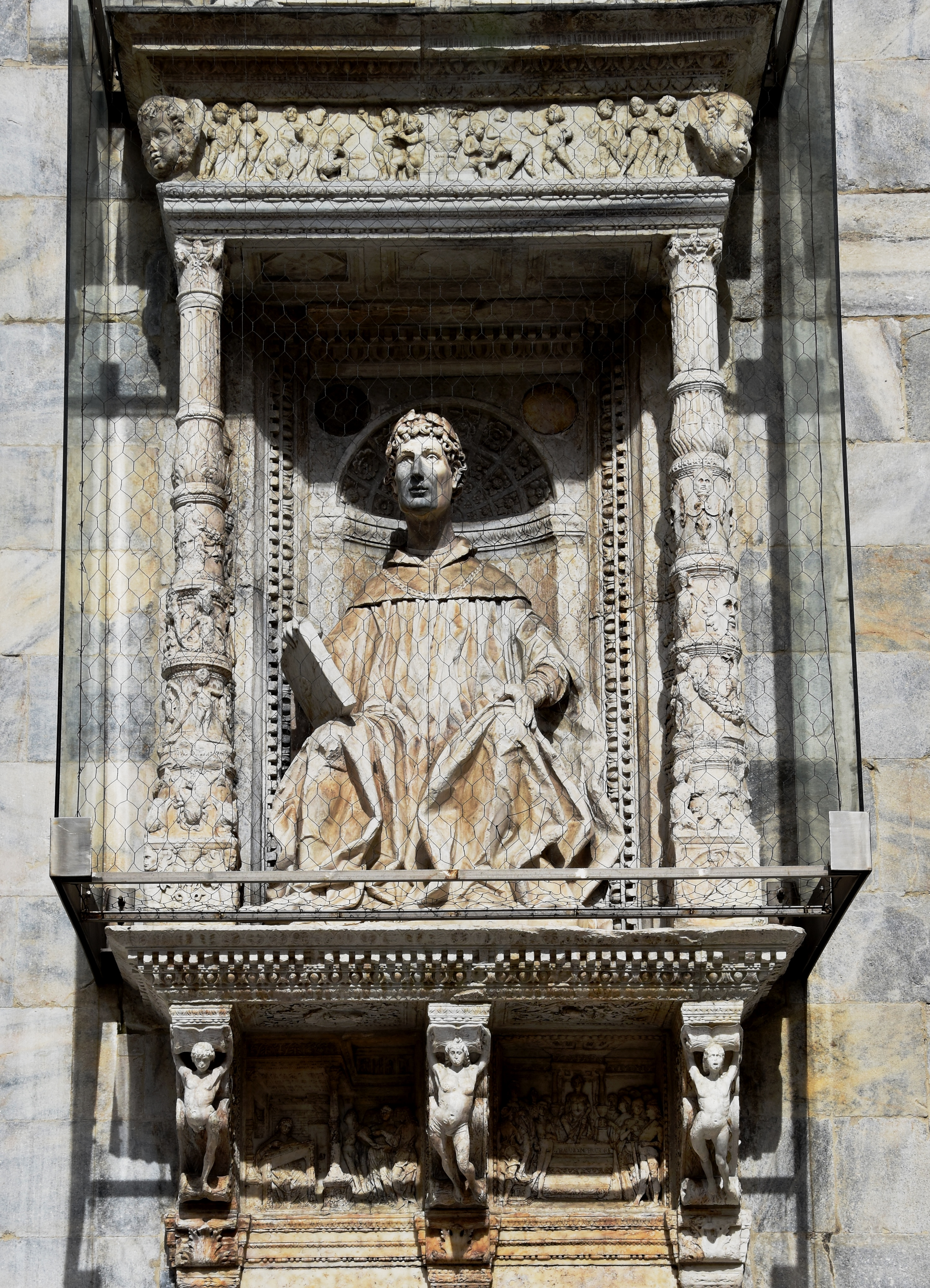 Plinio il Giovane: scultura sulla facciata principale del Duomo di Como.